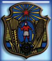 Blason de la ville de Bečej en Serbie, Voïvodine